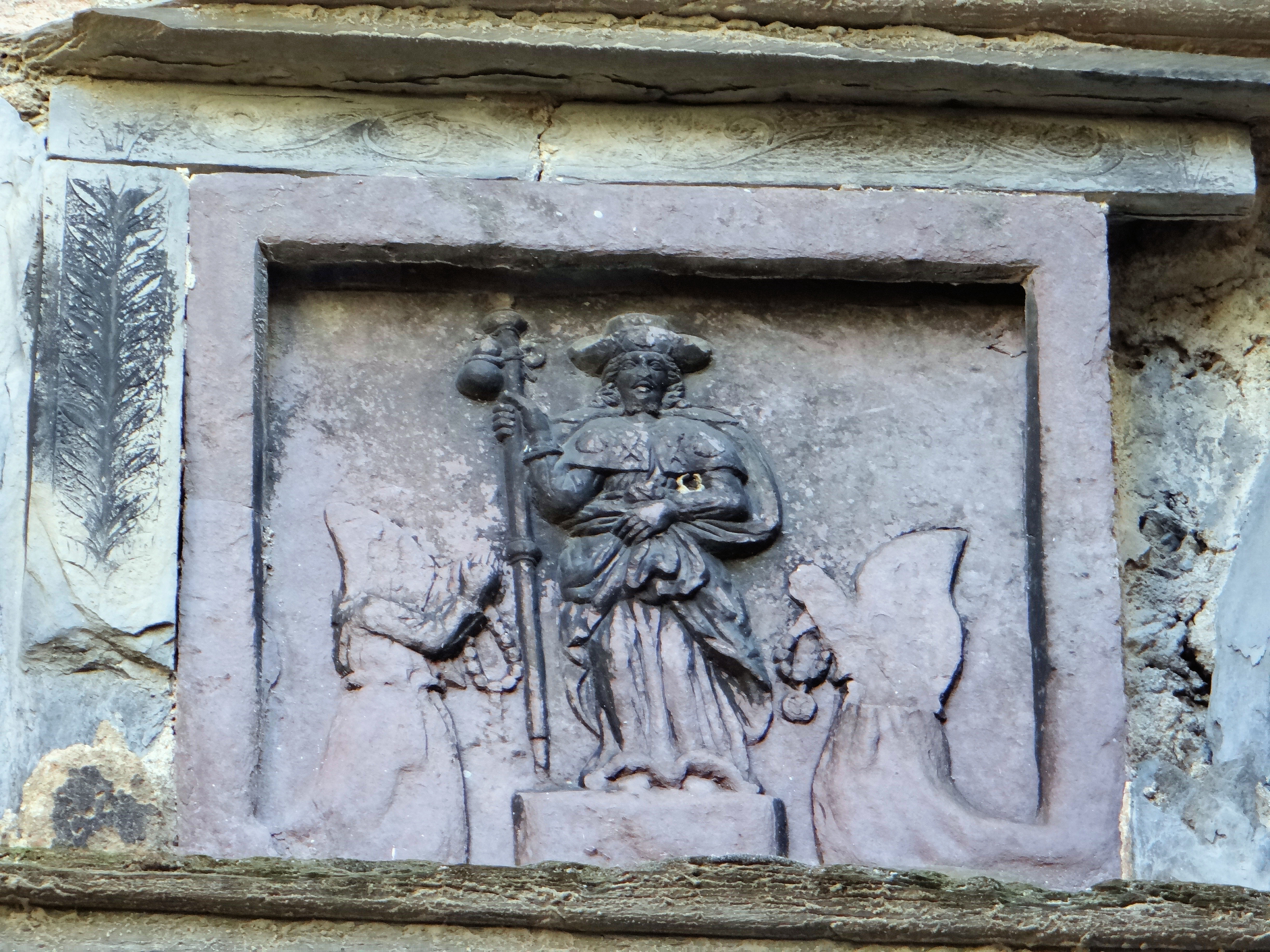 Saorge - Chapelle des Pénitents blancs - Au-dessus du portail, saint Jacques entouré de deux pénitents